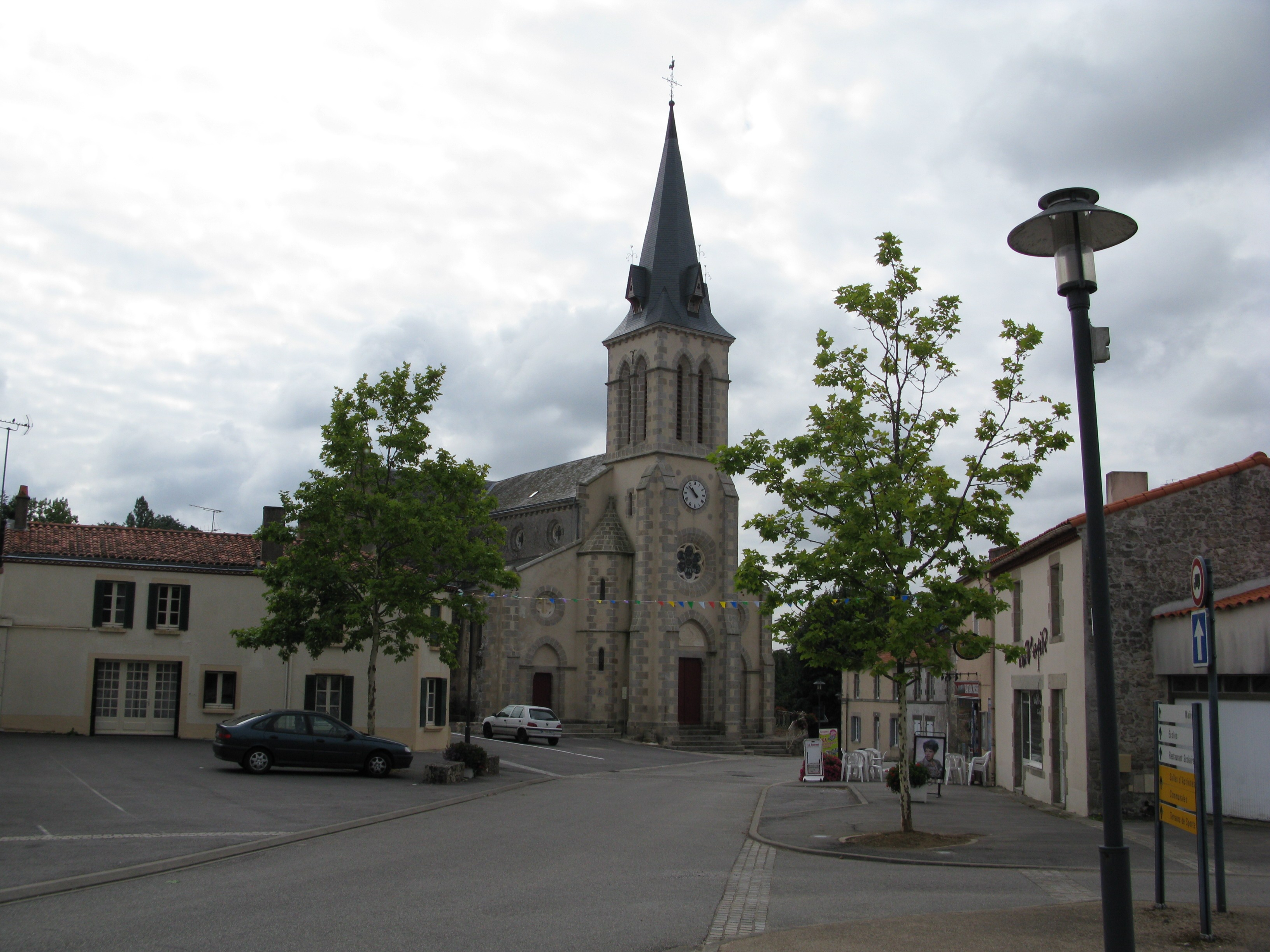 Église de Saligny